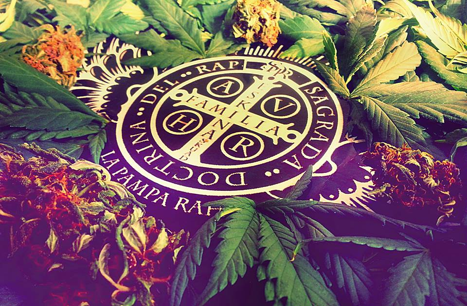 Imagen del Grupo